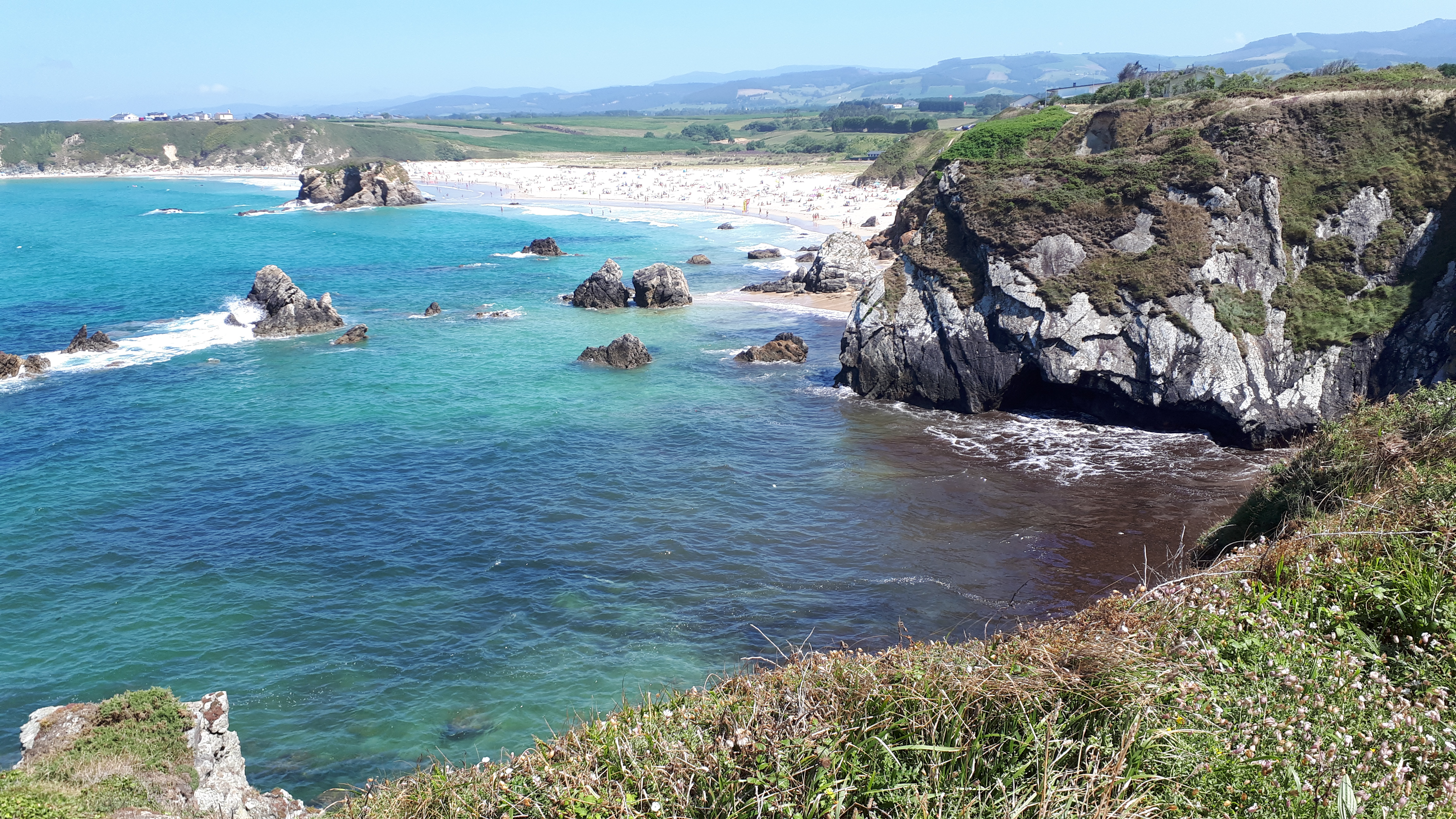 Playa de Penarronda de Barres (Asturias - España). Tiene una longitud de 800 m. Está dominada por el Castelo, enorme piedra redonda horadada por un túnel que da nombre a la playa. Declarada Monumento Natural por su sistema dunar y la presencia de especies vegetales protegidas, como el alhelí de mar y el narciso marino. This is a photography of a Special Area of Conservation in Spain with the ID: ES0000317. Natura2000 entry, EEA entry